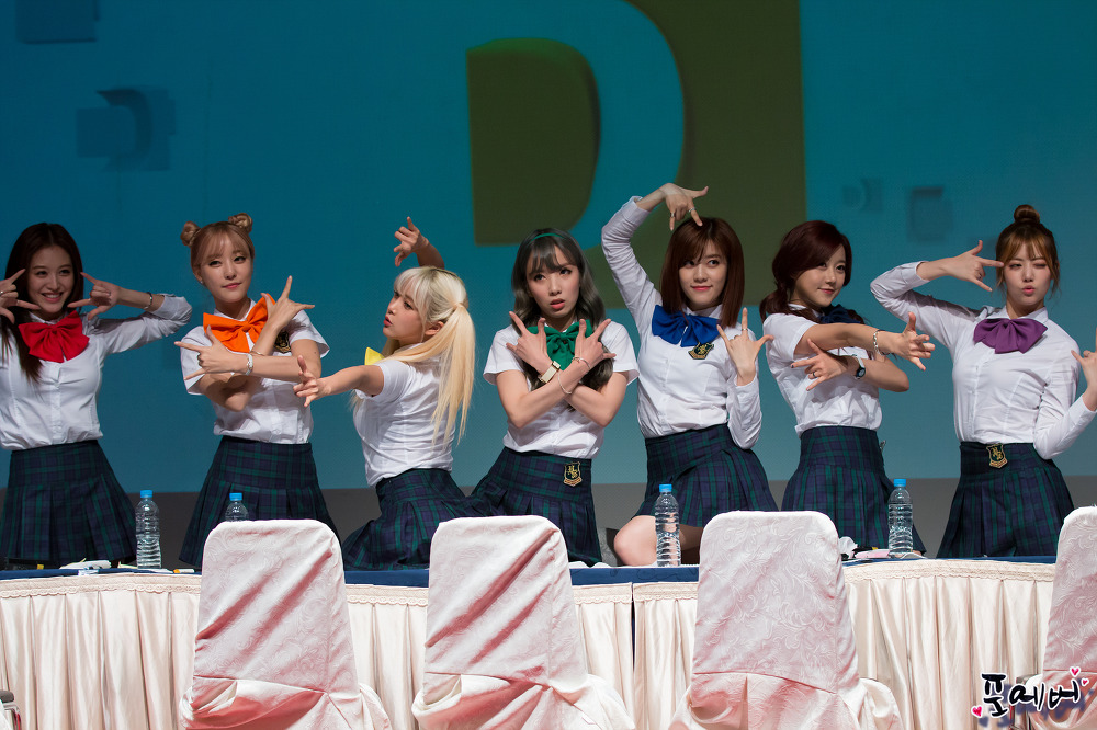 레인보우-PRISM 신촌유플렉스